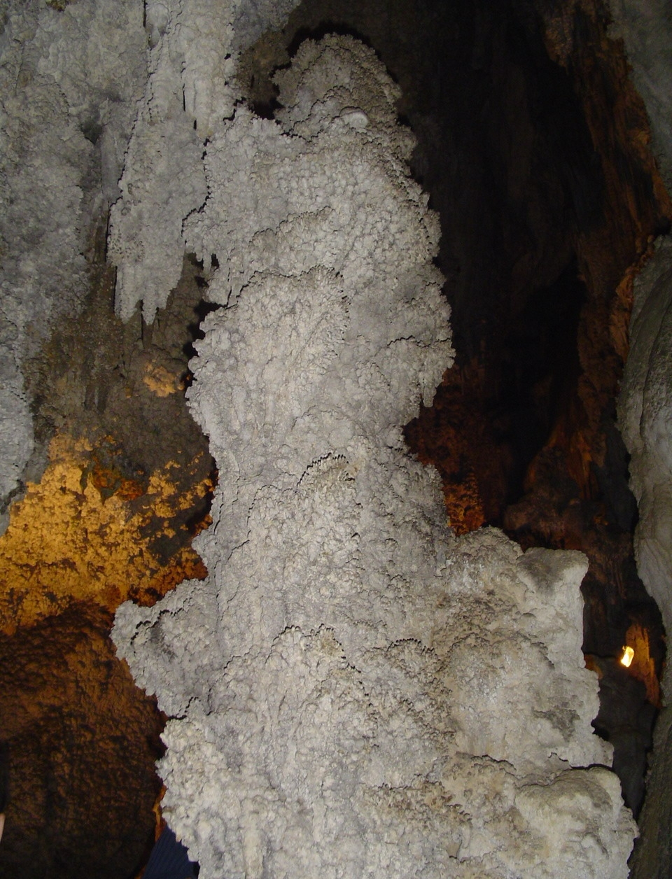 Uhlovitsa